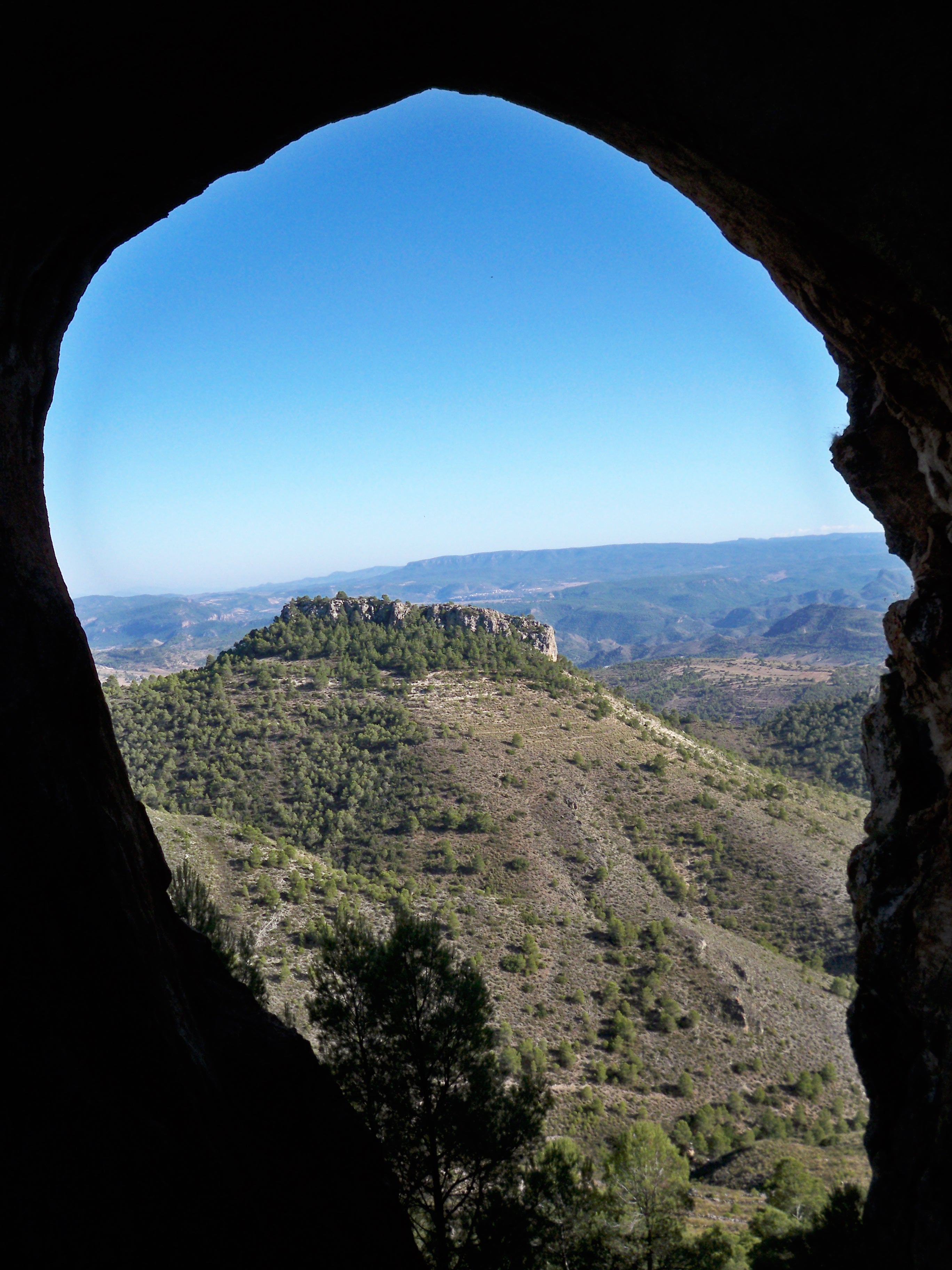 Imagen desde "El Bujero" en el municipio de Molinicos (Albacete), monumento natural.